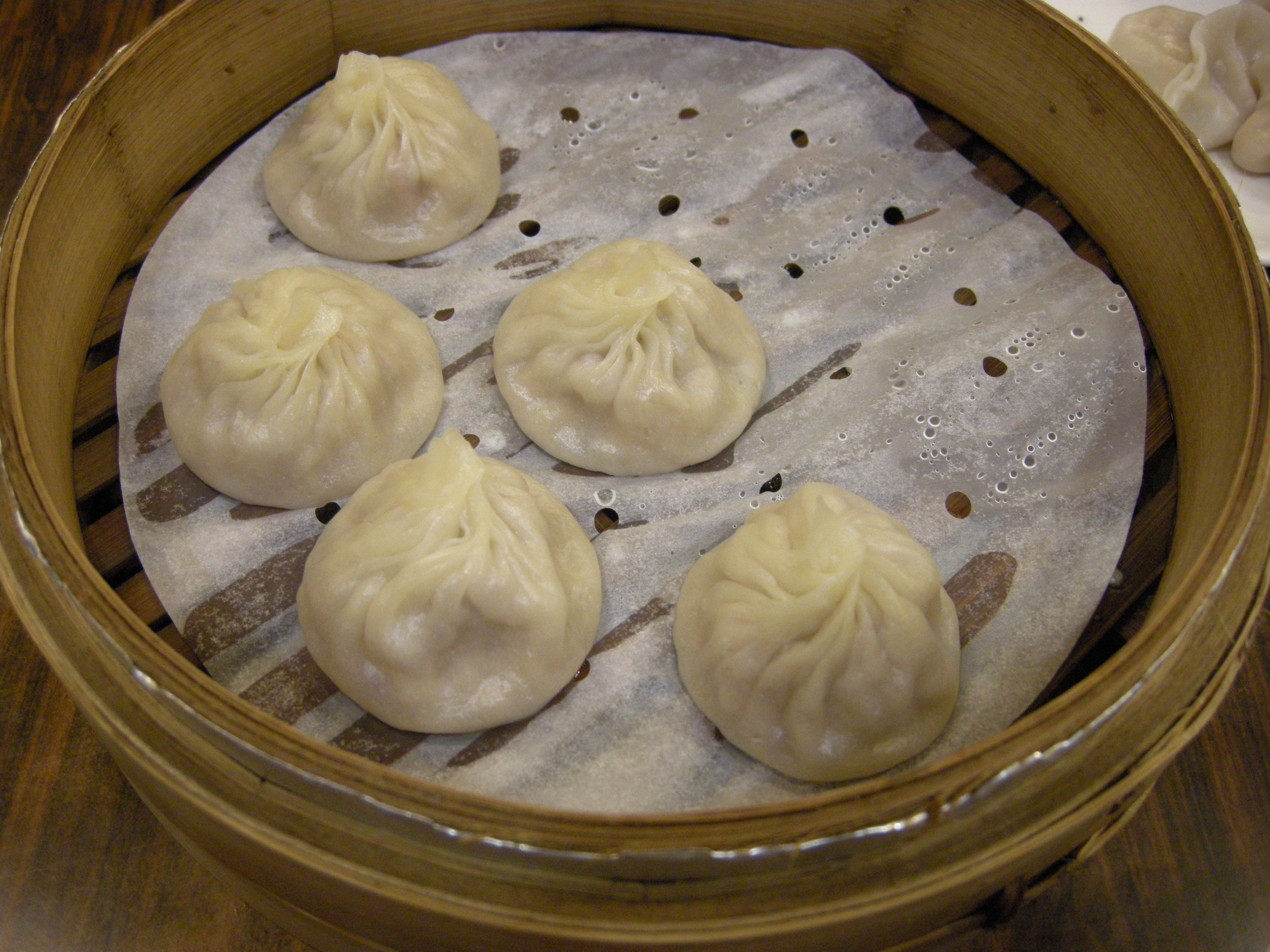 鼎泰豐的小籠包。